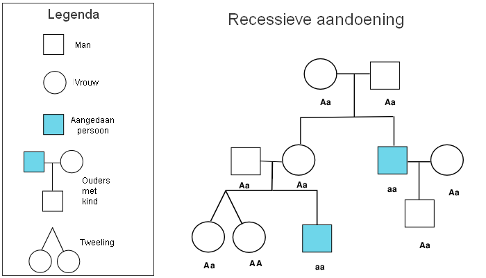 Schema van een recessieve genetische afwijking in een familie, gemaakt aan de hand van het schema File:PedigreechartB.png op de Engelstalige Wikipedia.